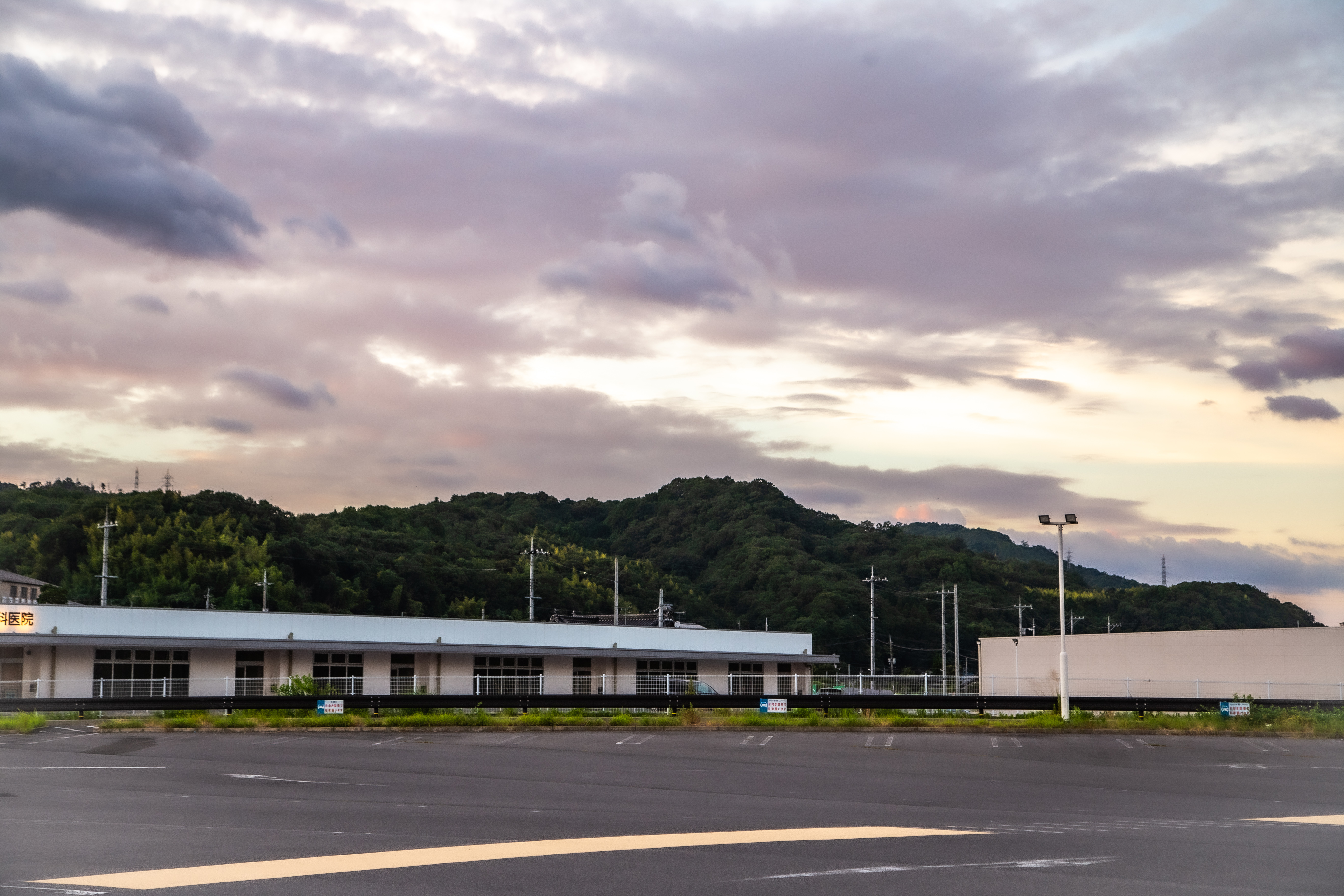 広島県広島市佐伯区にある中世の山城、水晶城跡。